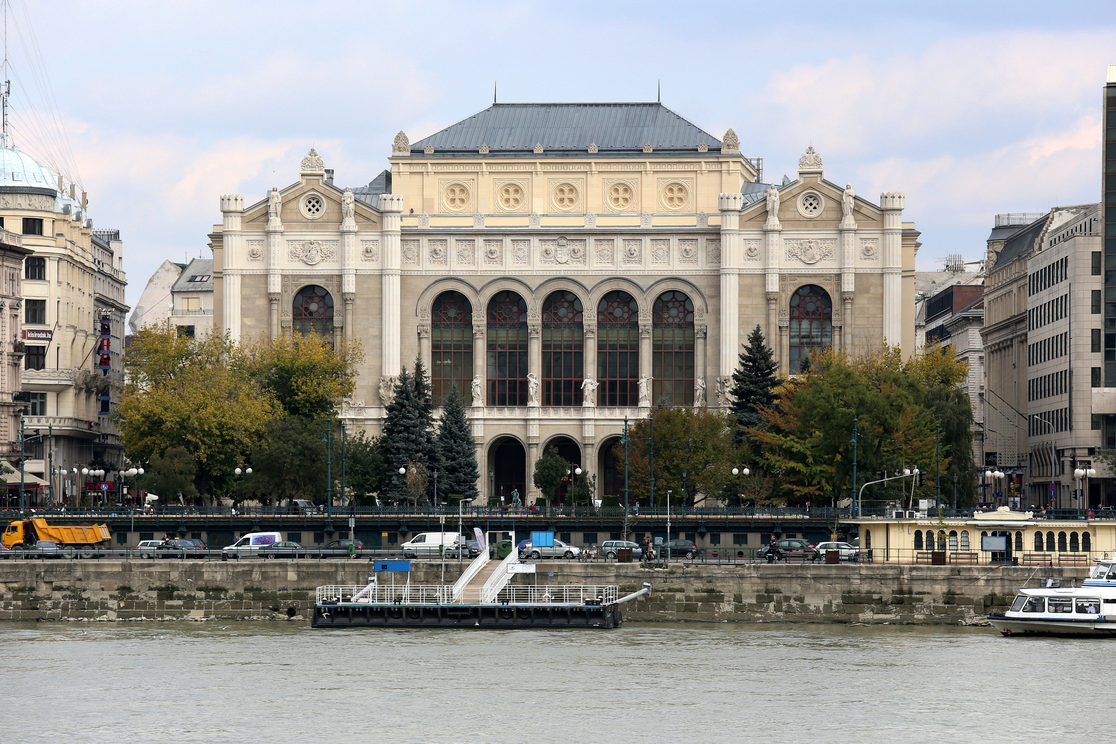 Pesti Vigadó This is a photo of a monument in Hungary. Identifier: 664